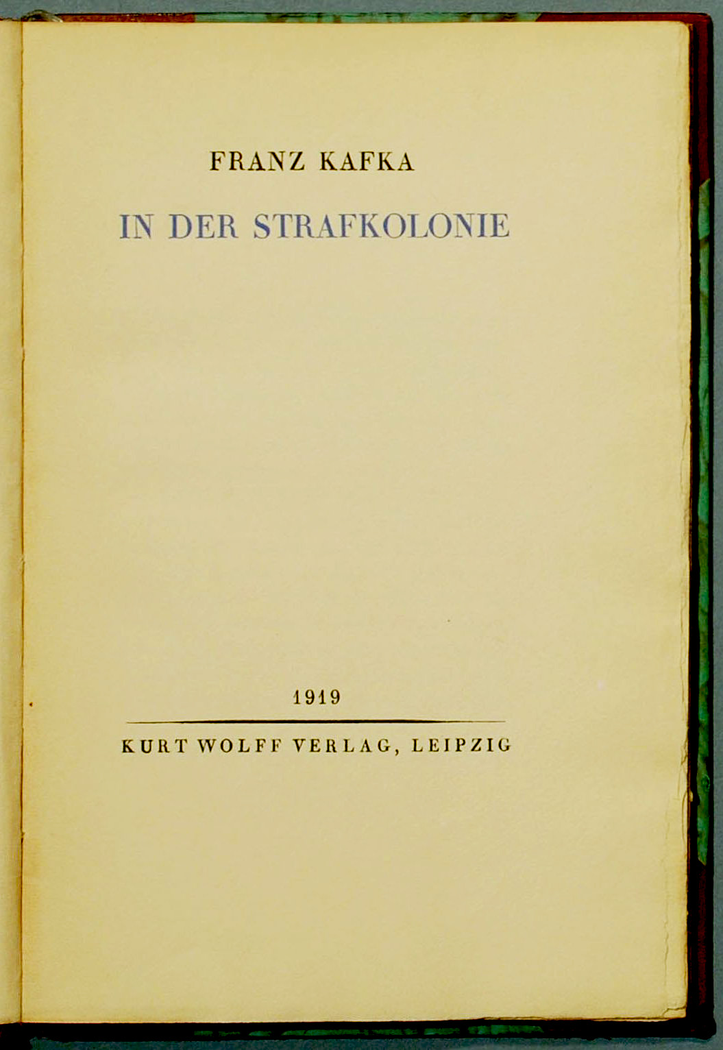 Kafka, Franz: In der Strafkolonie. Titelblatt des Erstdruckes.